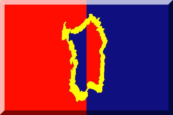 bandiera dell'A.C. Porto Torres